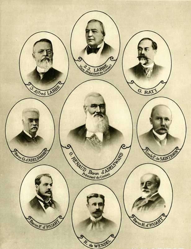 Conseil d'administration de la Société des Aciéries de Longwy (1888) : M. le Baron Renaud Oscar d'Adelsward, M. le Baron Gustave d'Adelsward, M. Jean-Joseph Labbé, M. Jean-Alfred Labbé, M. Gustave Raty, M. le Comte de Saintignon, M. Robert de Wendel, M. le Baron Hyppolyte d'Huart, M. le Baron Fernand d'Huart